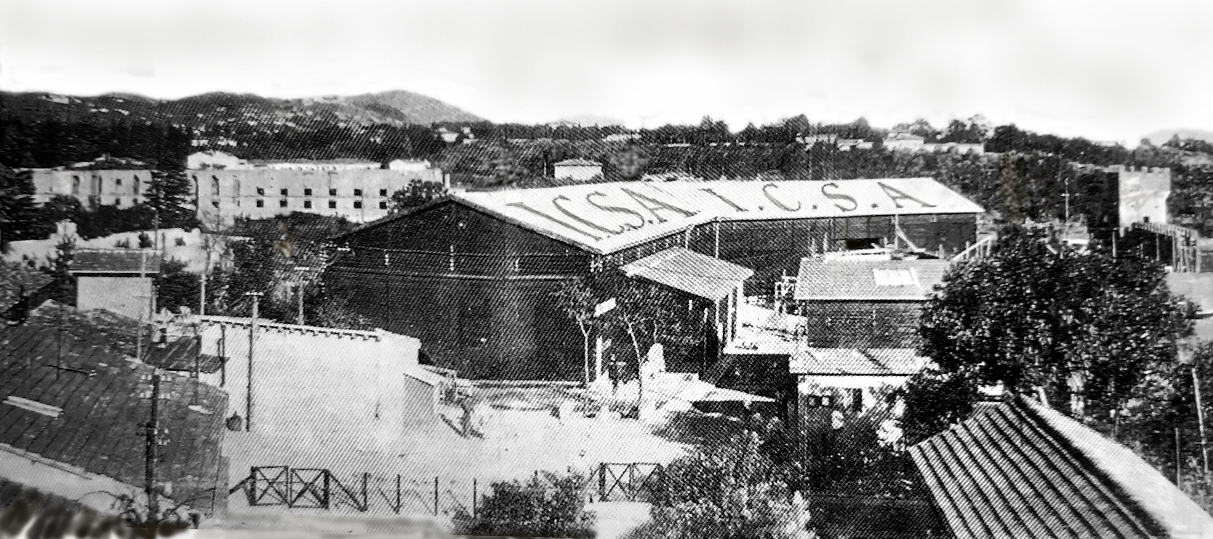 Stabilimenti cinematografici della I.C.S.A. a Firenze Rifredi alla fine degli anni venti. Panorama